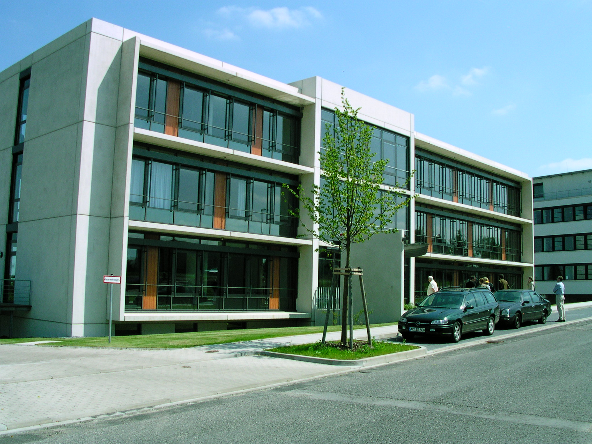 Aachen, Pascalstraße, Europazentrale von Emerson Climate Technologies, Architekten Nellessen Brasse Partner